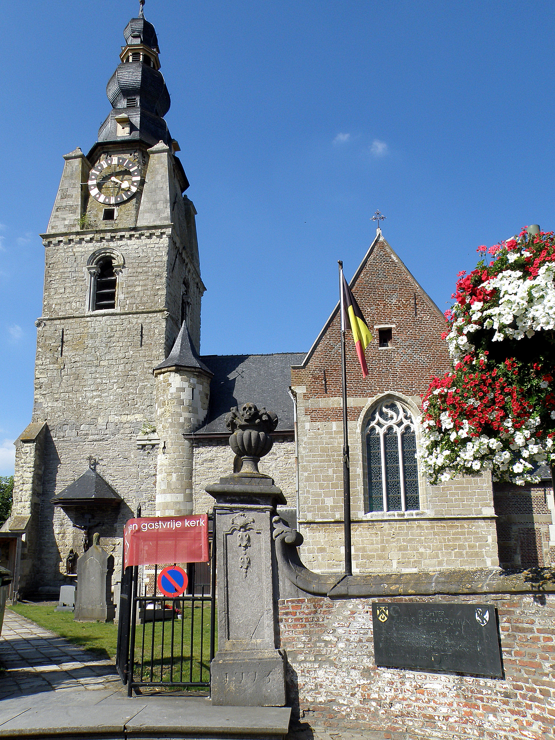 Mespelare (section de la comm. de Termonde, dans la prov. de Flandre-Orientale, Belgique). Église Sainte-Aldegonde (en néerl. Sint-Aldegondiskerk), XIIe siècle (choeur et nef), vers 1300 (clocher), début XVe (transept). Remarquer en bas à droite, plaque commémorative en l'honneur du poète Justus de Harduwijn, qui fut curé de ce petit village au XVIIe siècle.